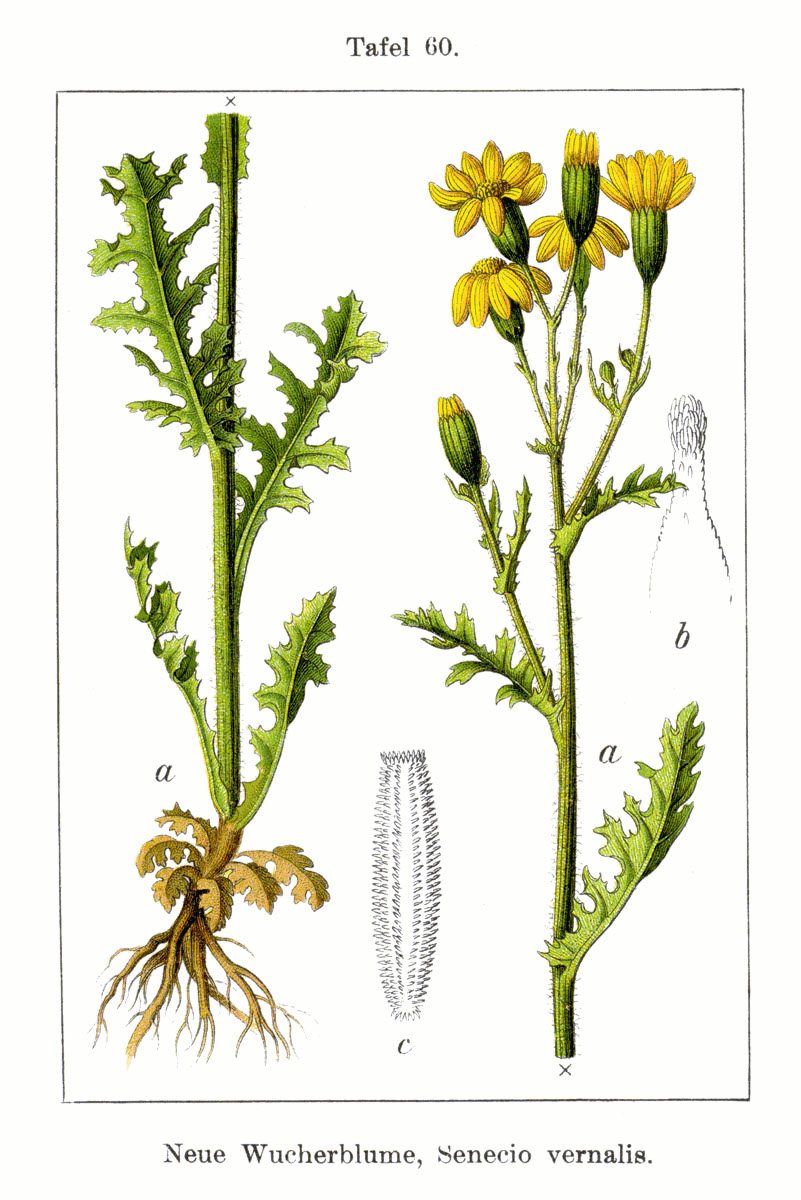 Senecio vernalis Waldst. & Kit. Original Description Neue Wucherblume, Senecio vernalis